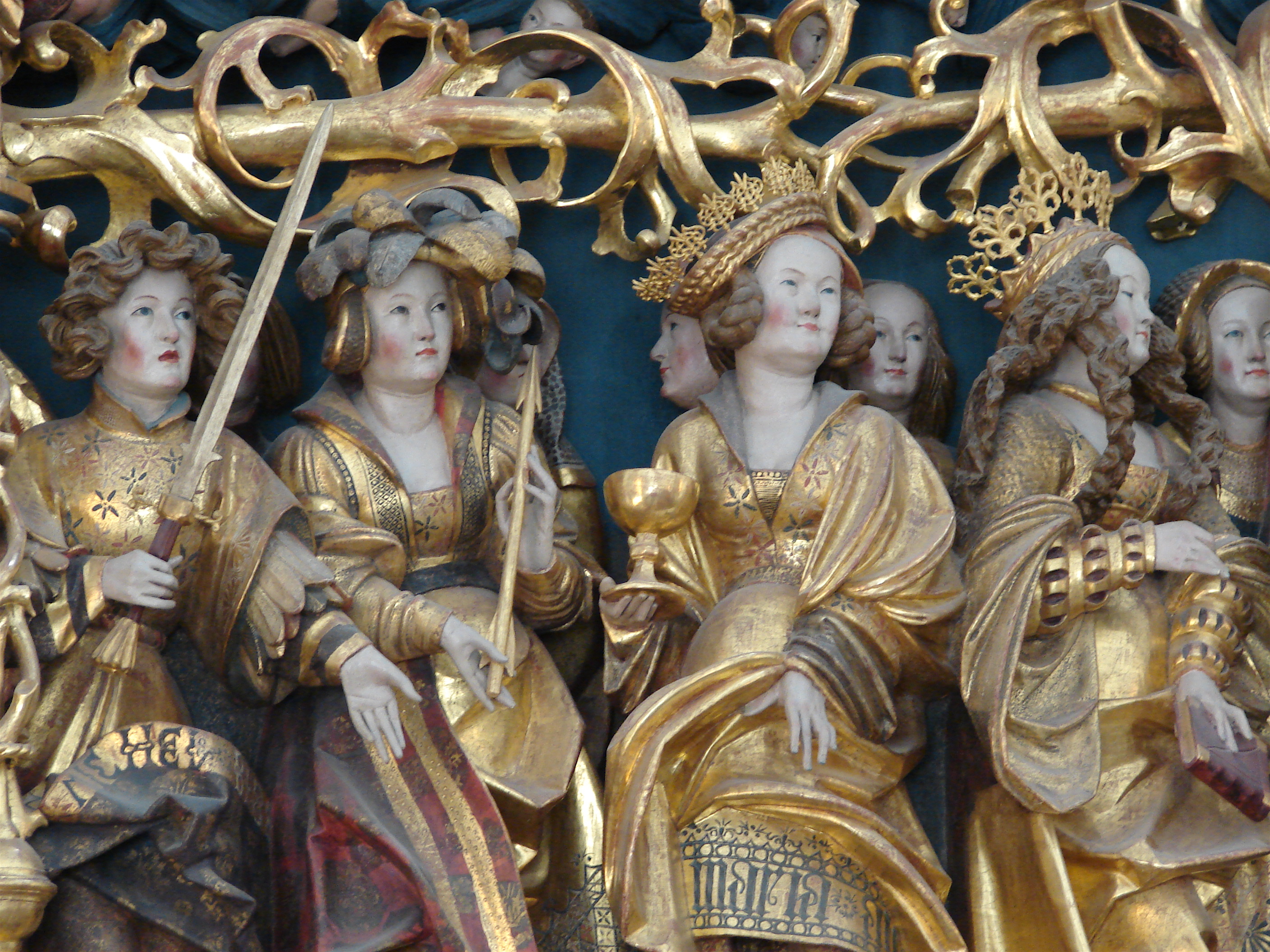 Detalje fra Claus Bergs altertavle i Sankt Knuds Kirke, Odense, Fyn, Danmark